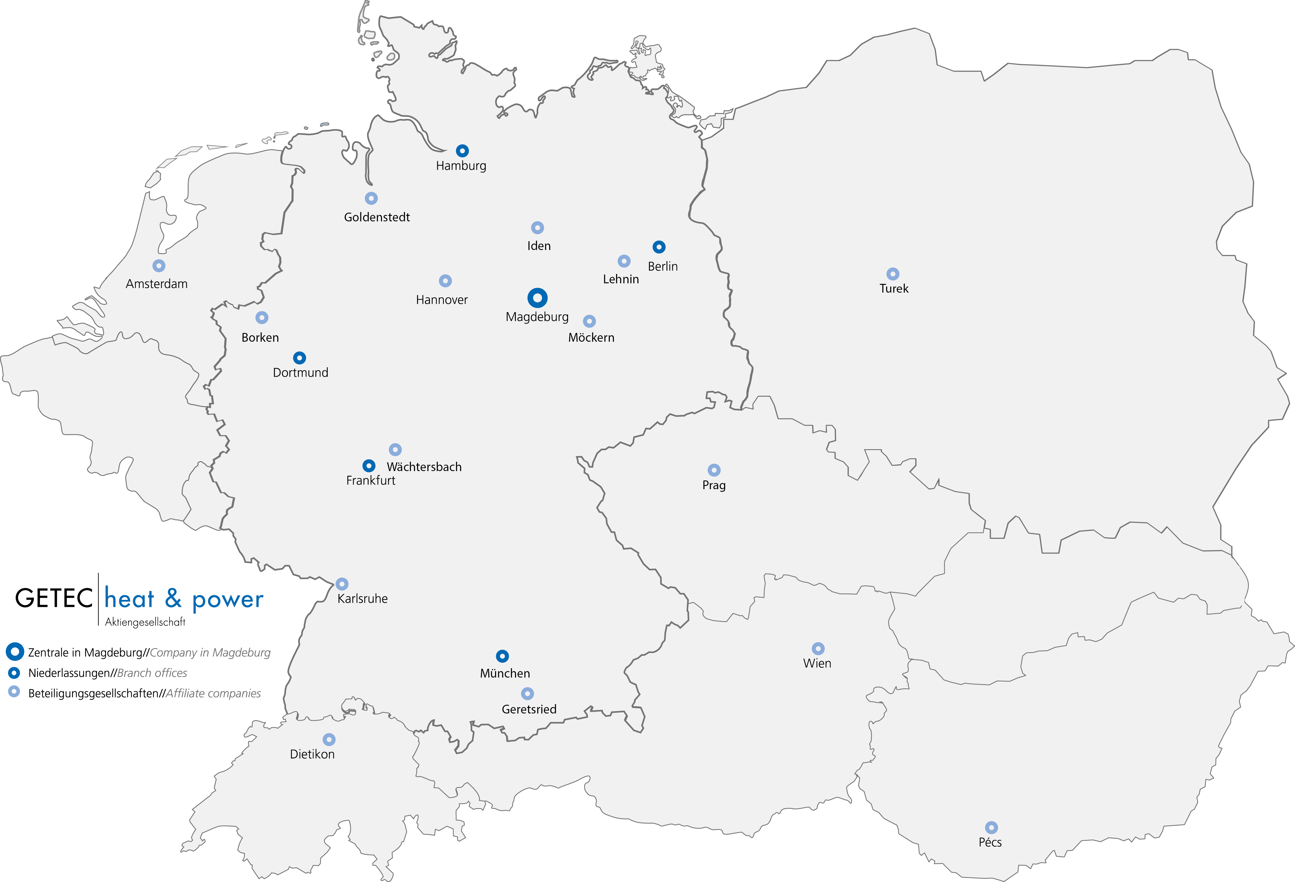 Standortkarte der Niederlassungen der Getec heat & power AG, 2016